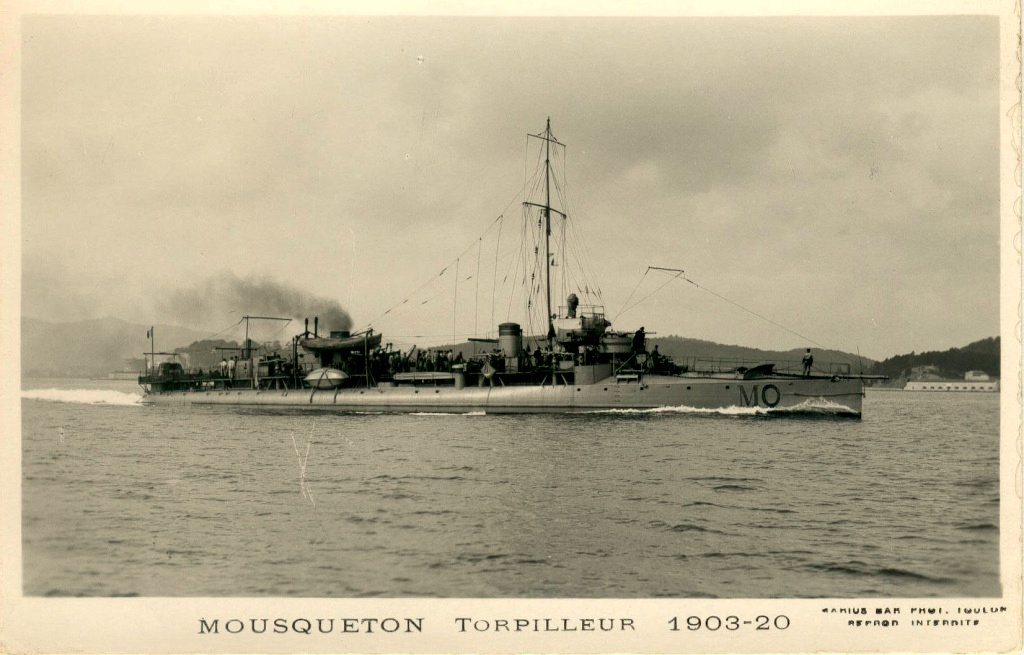 Contre-torpilleur français : Mousqueton (Classe Arquebuse)